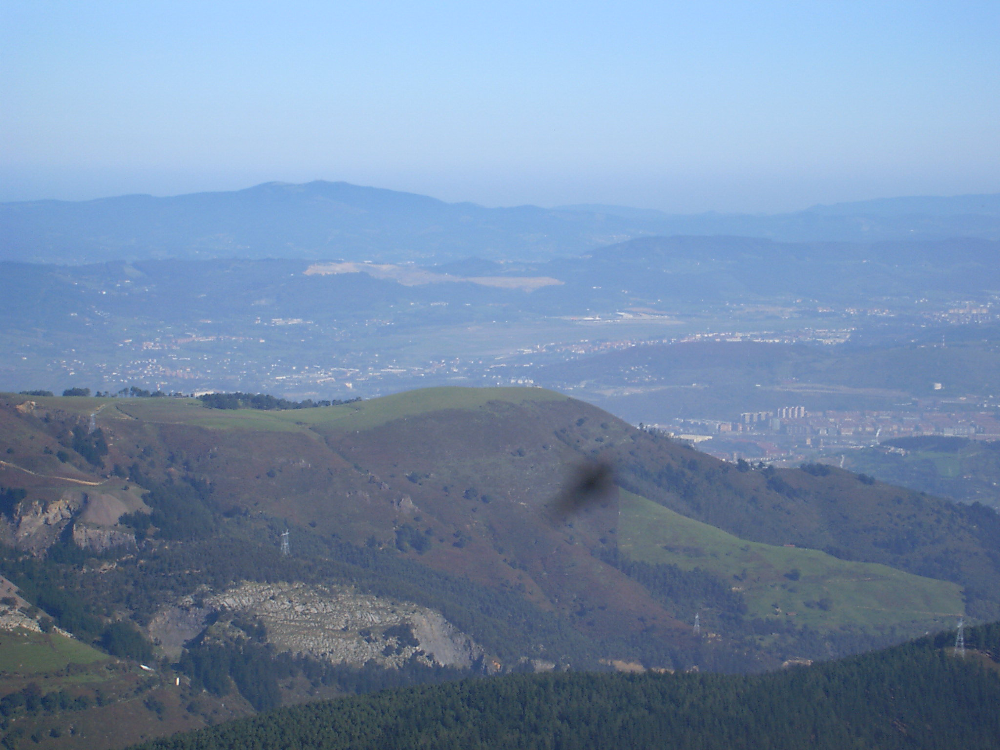 Argalario (trapagaran) mendia